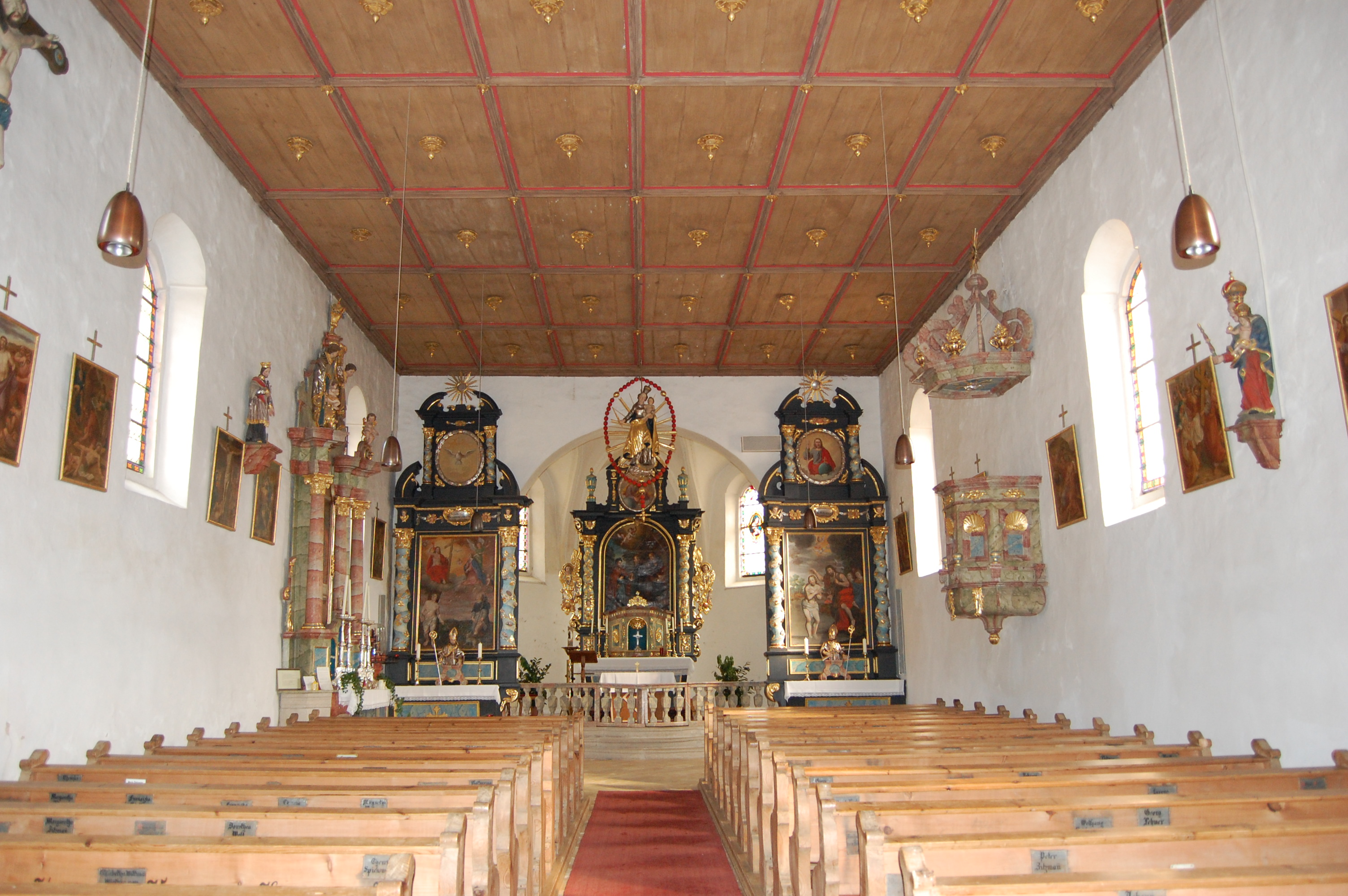 Innenraum der Wallfahrtskirche St. Jodok in Tännesberg, Landkreis Neustadt an der Waldnaab (2010)